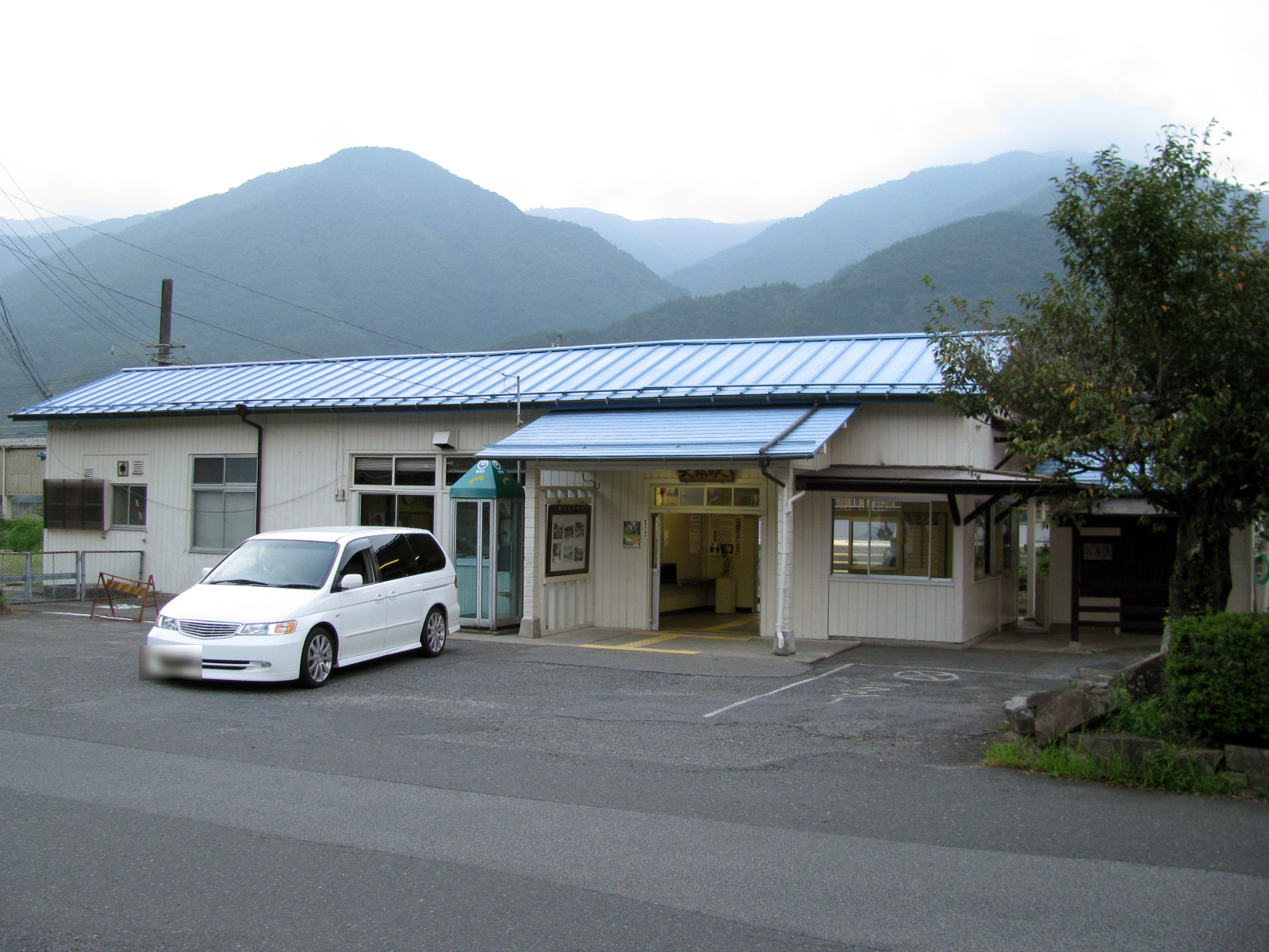 JR中央本線大桑駅